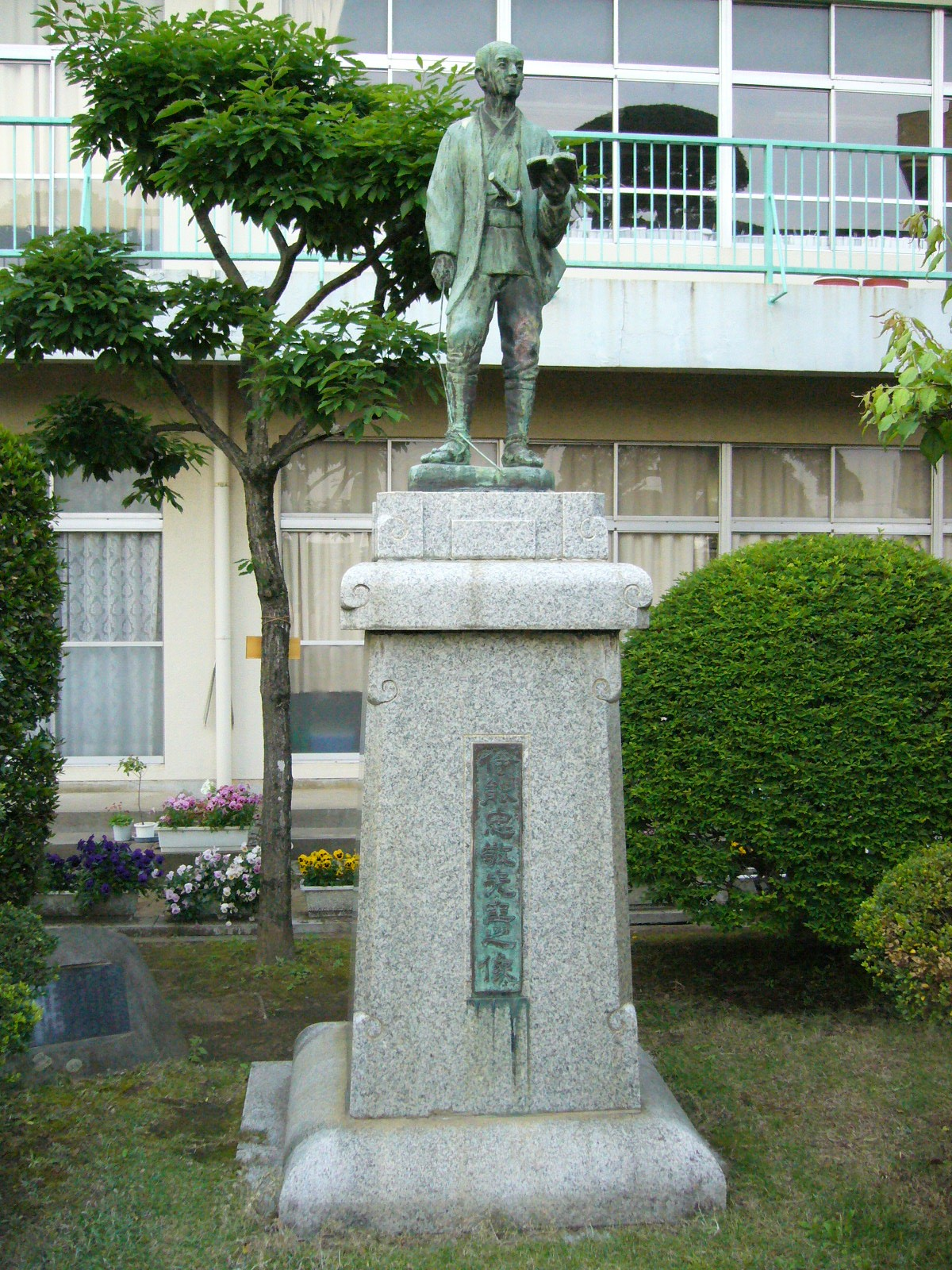 ino-tadataka,sawara-elementary-school,katori-city,japan